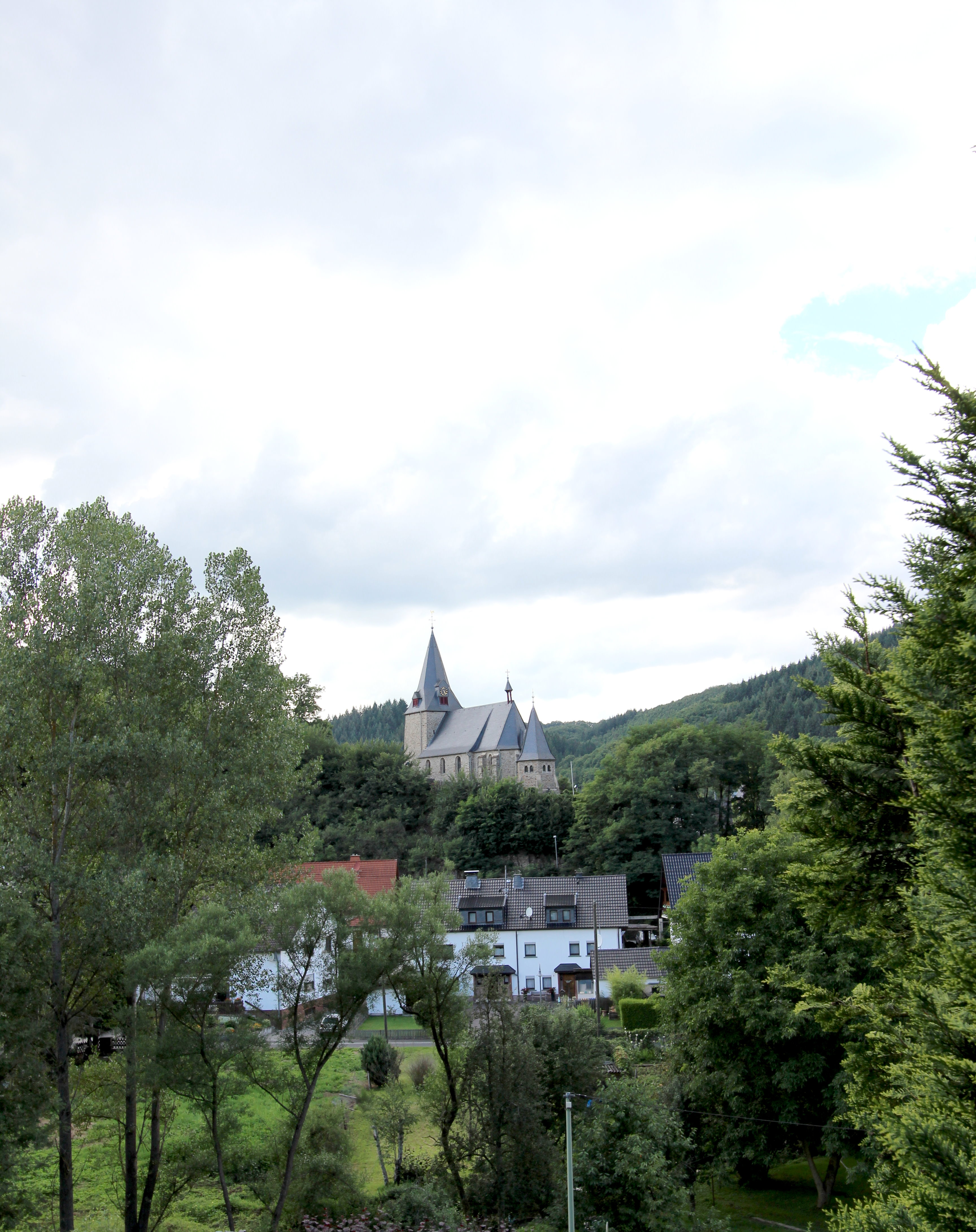 53520 Dümpelfeld. Im Hintergrund die katholische Pfarrkirche St. Cyriakus. Aufnahme von 2017.